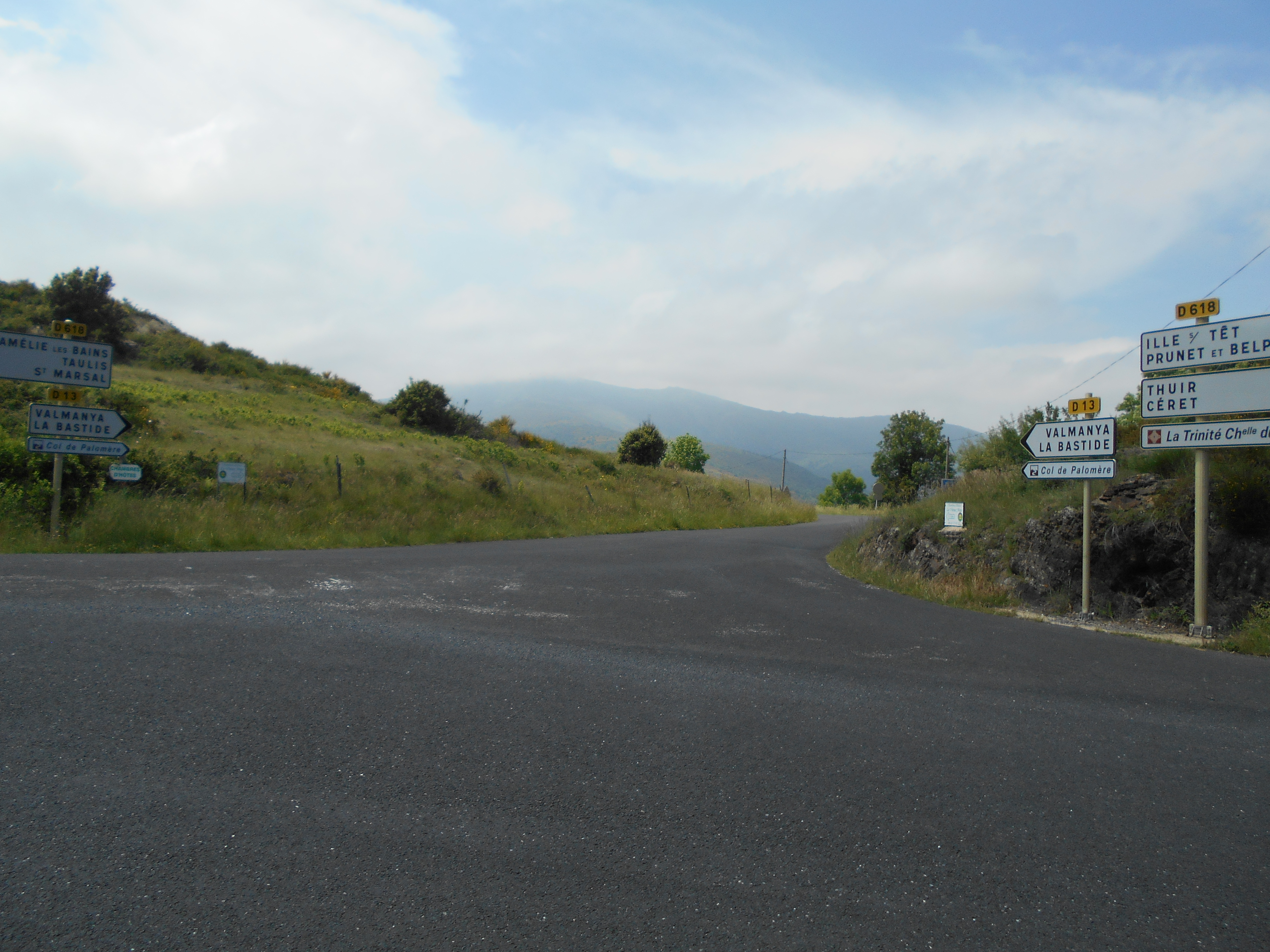 El Coll d'en Xatard, a Prunet i Bellpuig